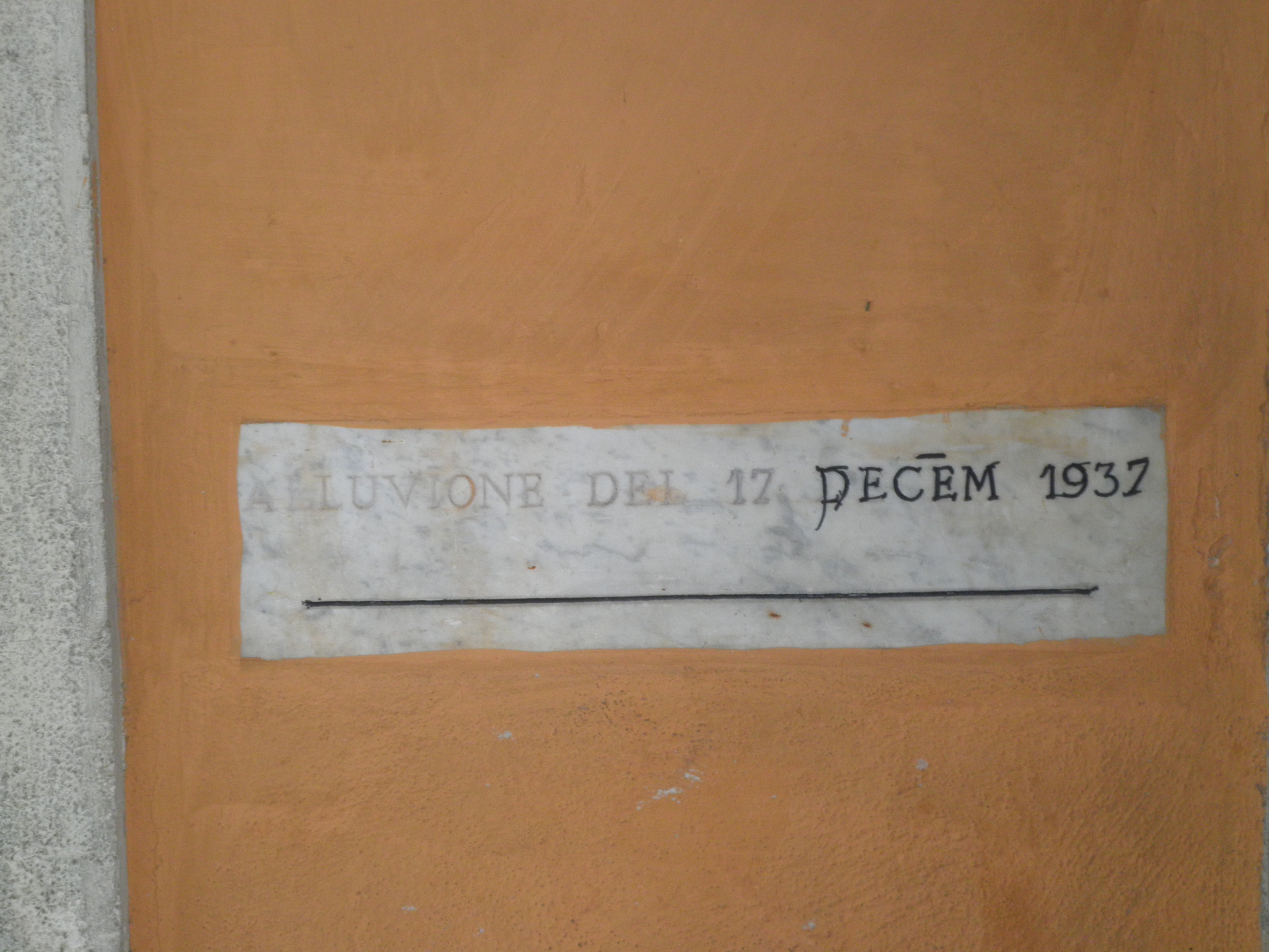 Roma, Isola Tiberina: memoria della piena del Tevere del 1937 (a fianco dell'attuale pronto soccorso)